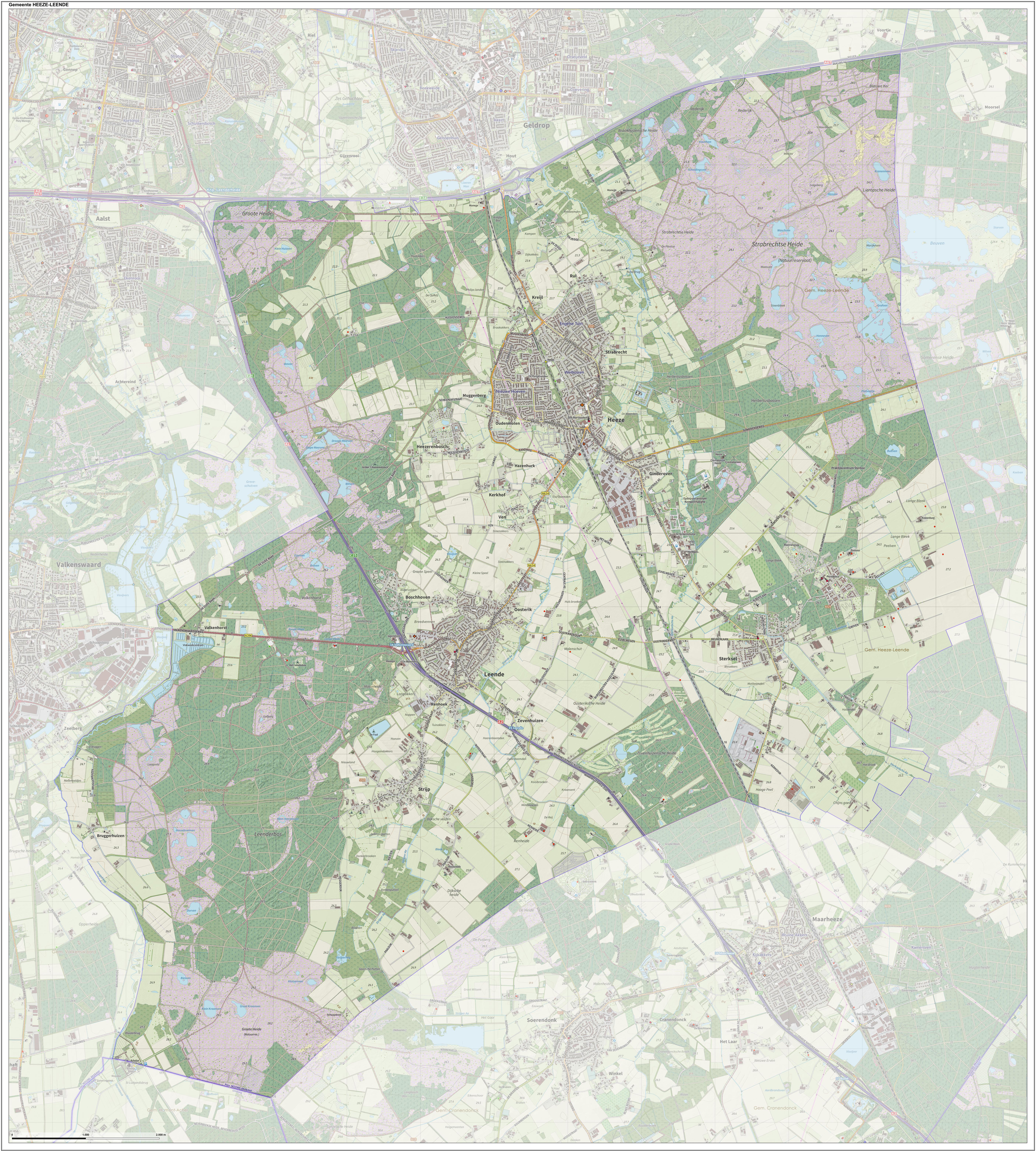 Topografische gemeentekaart. Resolutie: 400 pixels/km. Kaartbeeld samengesteld uit de open geodata van de Top10NL en Top25namen (Kadaster), Creative Commons-BY licentie. Gebouwvlakken uit open geodata BAG extract. Wegen uit de OpenStreetMap, OpenStreetMap community. Reliëfschaduw uit de Actuele Hoogtekaart AHN2. Samenstelling en kleurenschema: Jan-Willem van Aalst, met QGIS. Zie ook de Legenda.